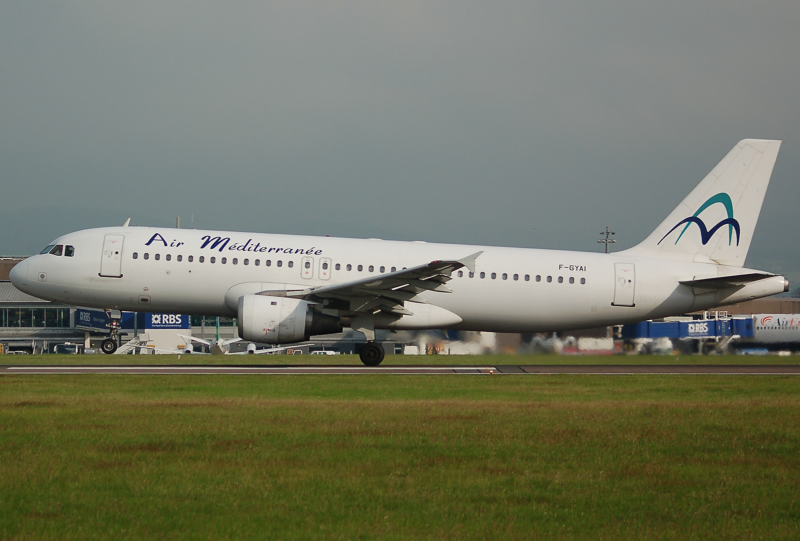 Air Méditerranée Airbus A320 F-GYAI at Edinburgh Airport.jpg